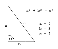 Zur Veranschaulichung